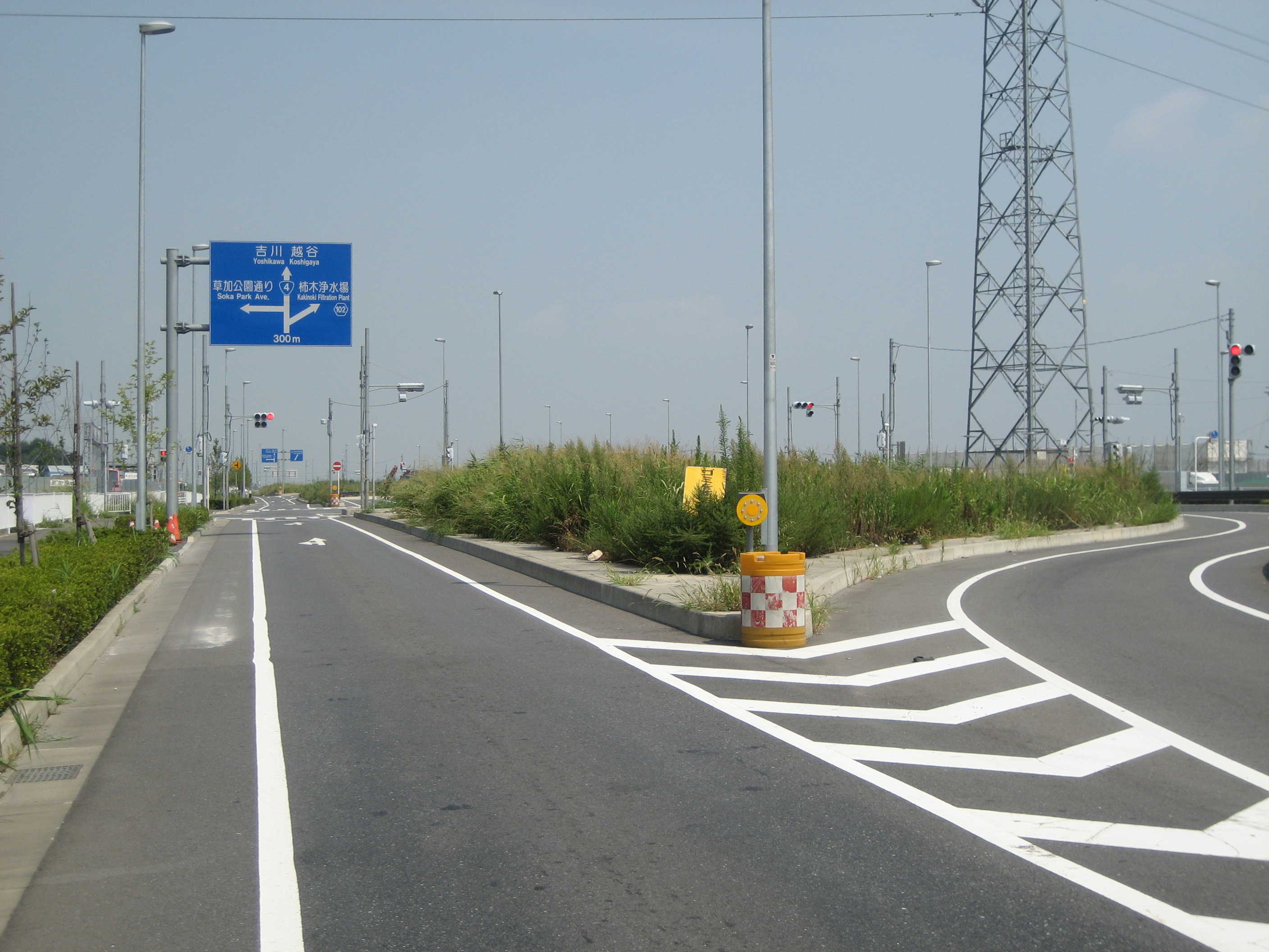 東埼玉道路越谷方面八潮市八条